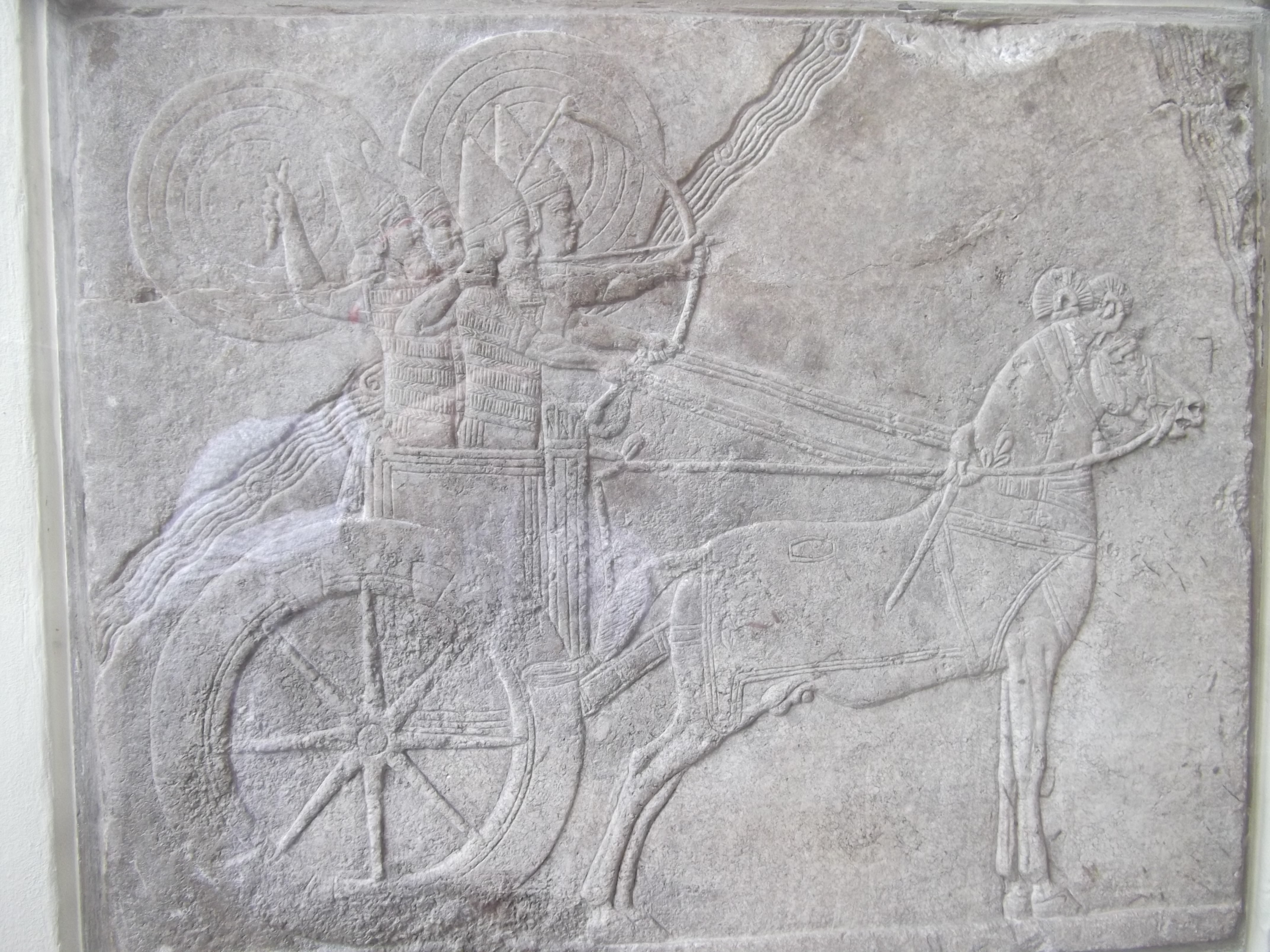 Relief um 650 v. Chr., Ninive, zeigt wahrscheinlich Feldzug Assurbanipals gegen die elamische Stadt Hamanu